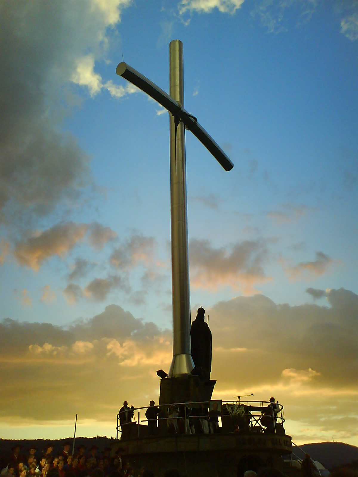 Krzyż Milenijny na Matysce podczas koncertu Józefa Skrzeka i zespołu góralskiego Grojcowianie - koncert poświęcony ks. prałatowi Stanisławowi Gawlikowi w trzecią rocznicę jego śmierci